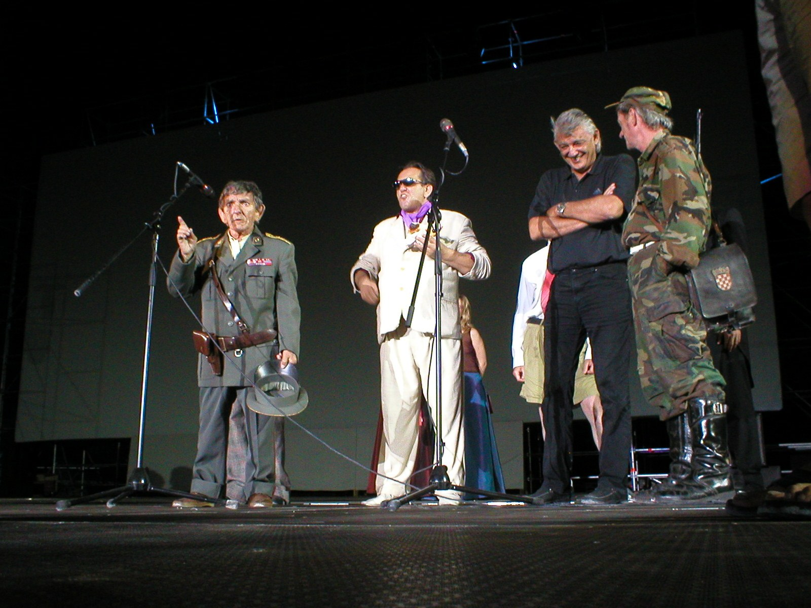 Članovi Noćne More na film festivalu u Puli, Ljeto 2003.